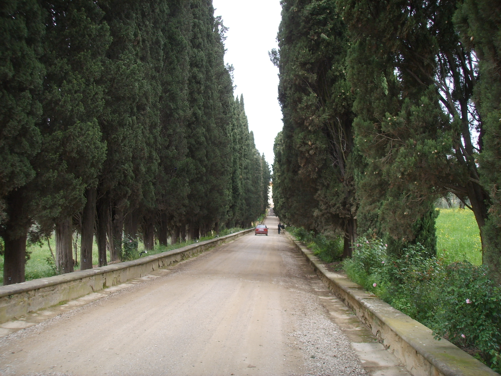 Villa la pietra, viale dei cipressi